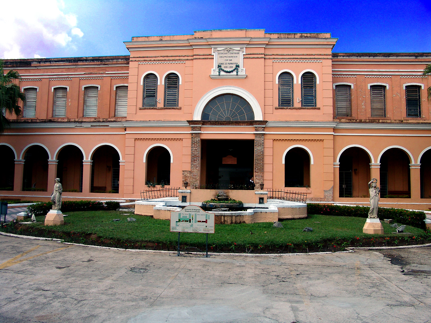 Memorial do Imigrante, r. Visconde de Parnaíba, 1316 – Mooca, São Paulo SP.